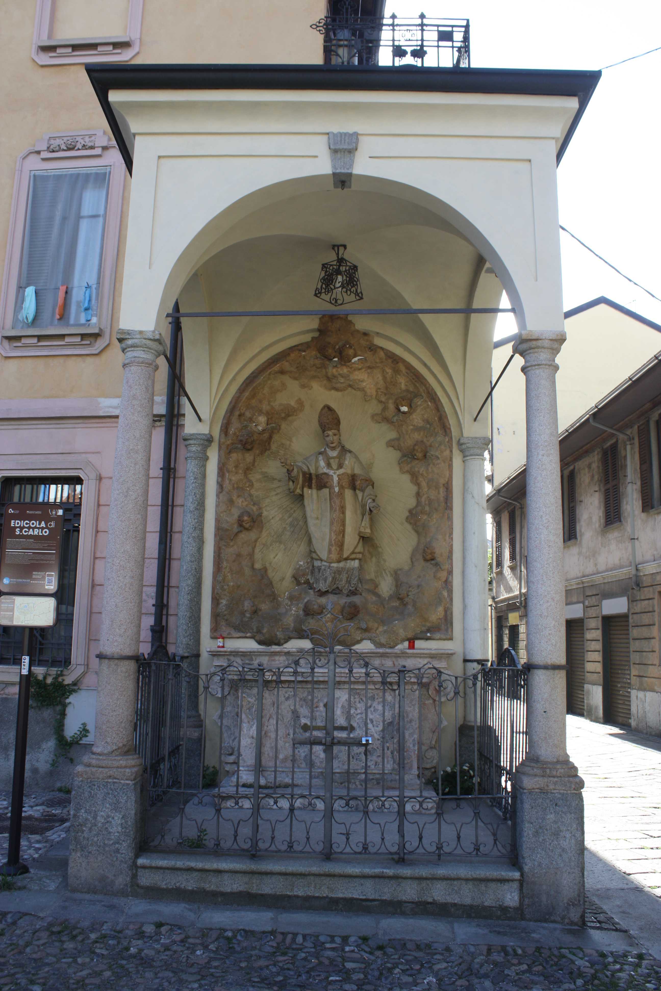 Edicola votiva di San Carlo Borromeo a Busto Arsizio, Italia.